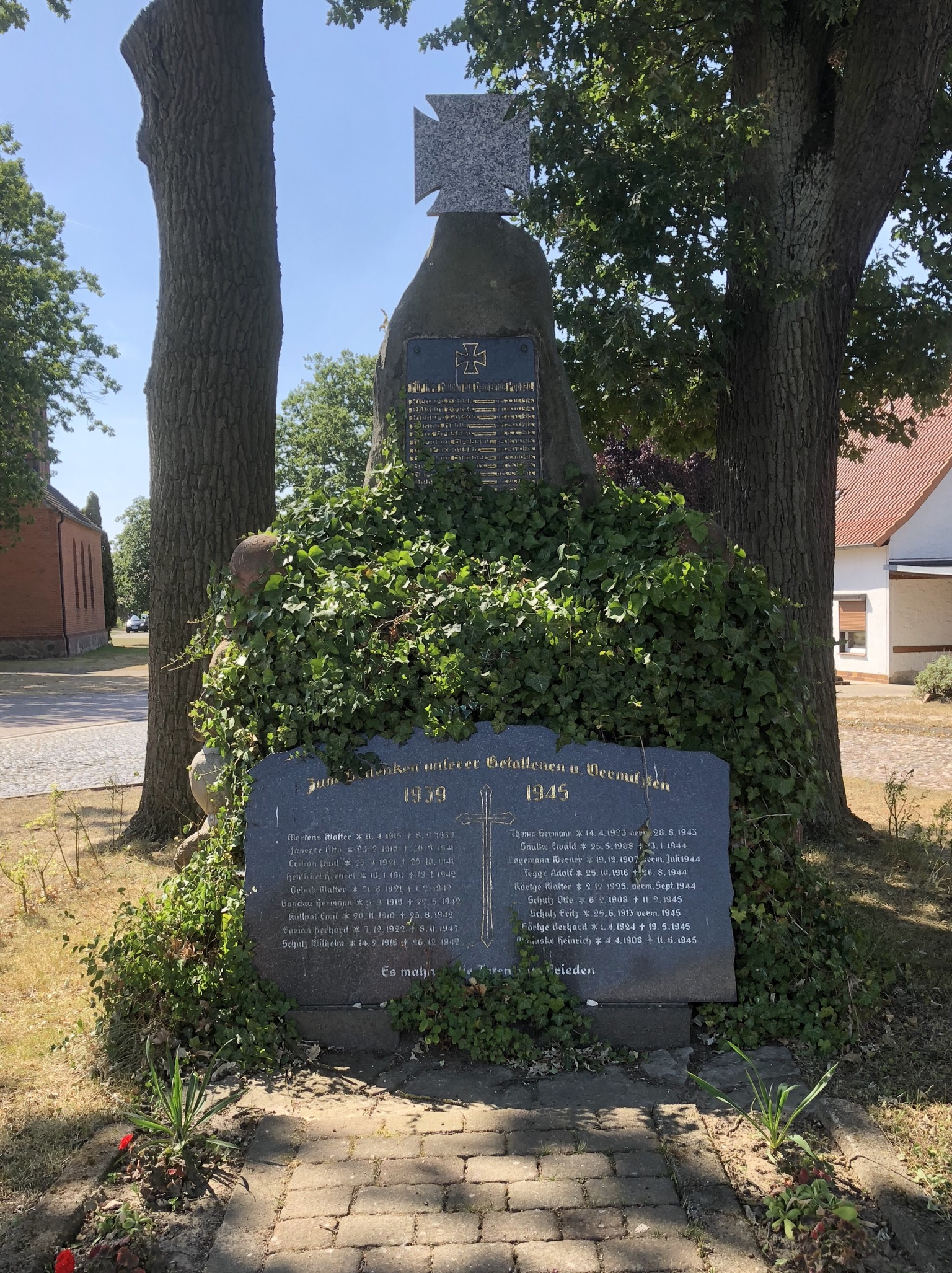 Kriegerdenkmal in Poppau, Beetzendorf, Altmarkkreis Salzwedel